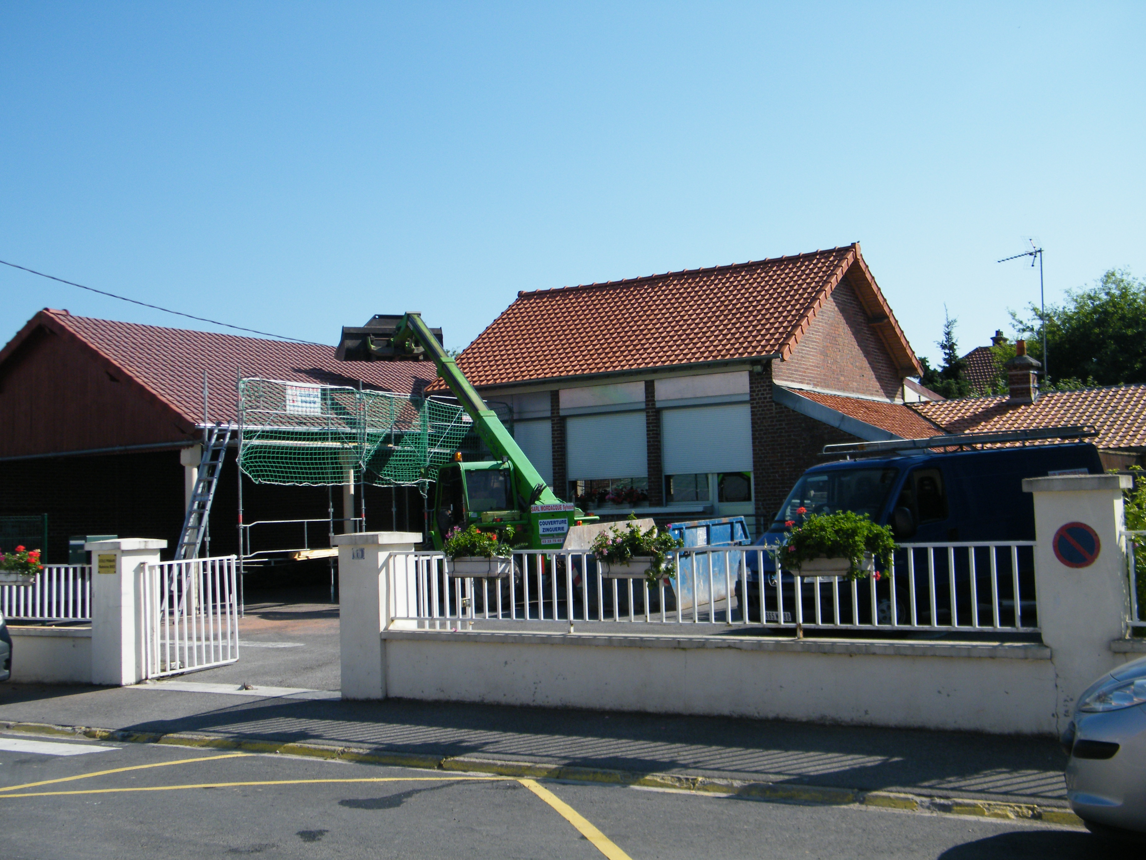 Cour d'école.